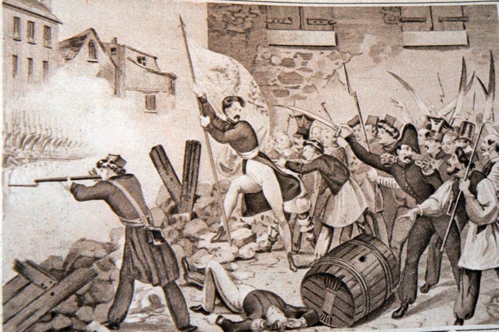 Reduta Ordona